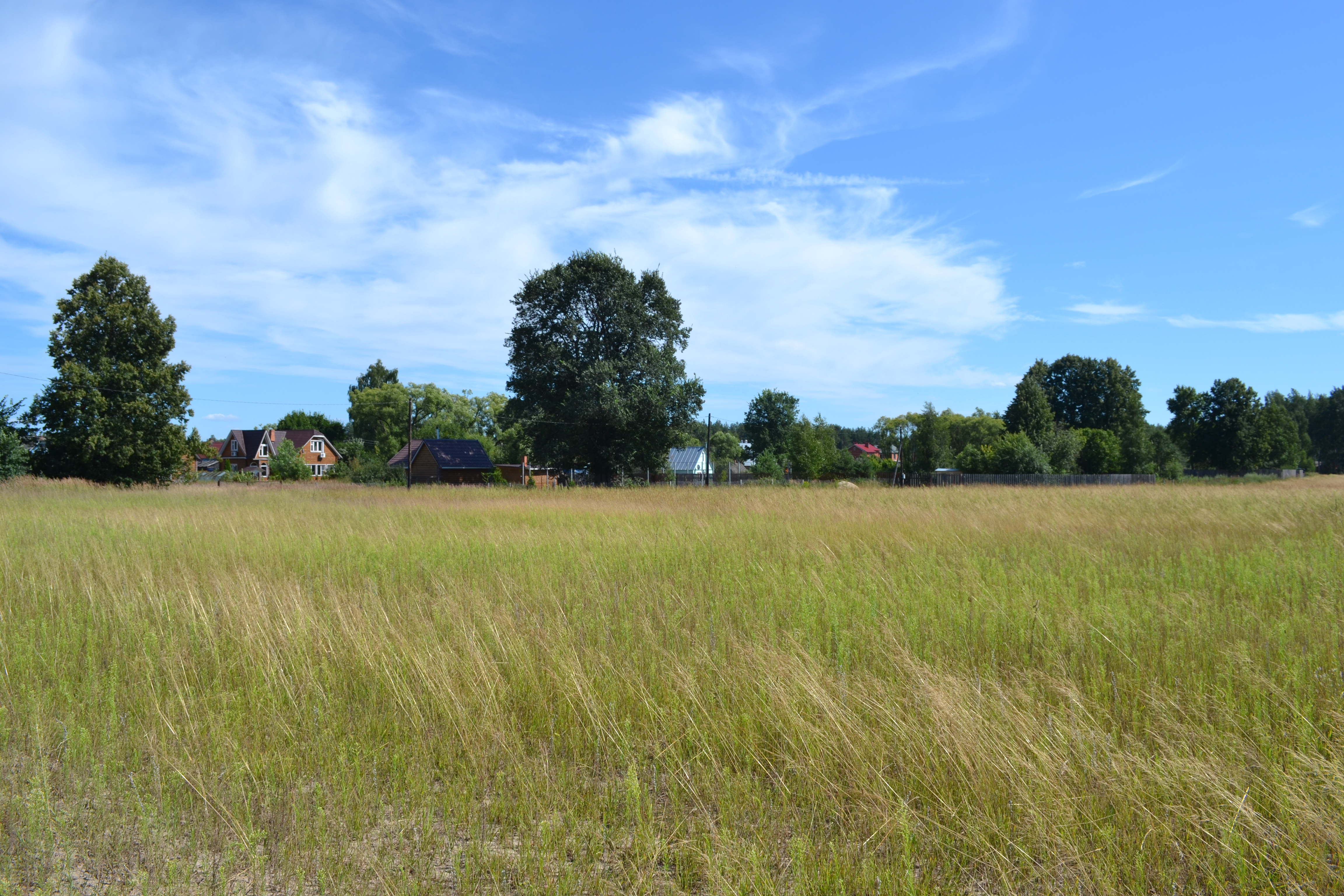 Селянино (Шатурский район)